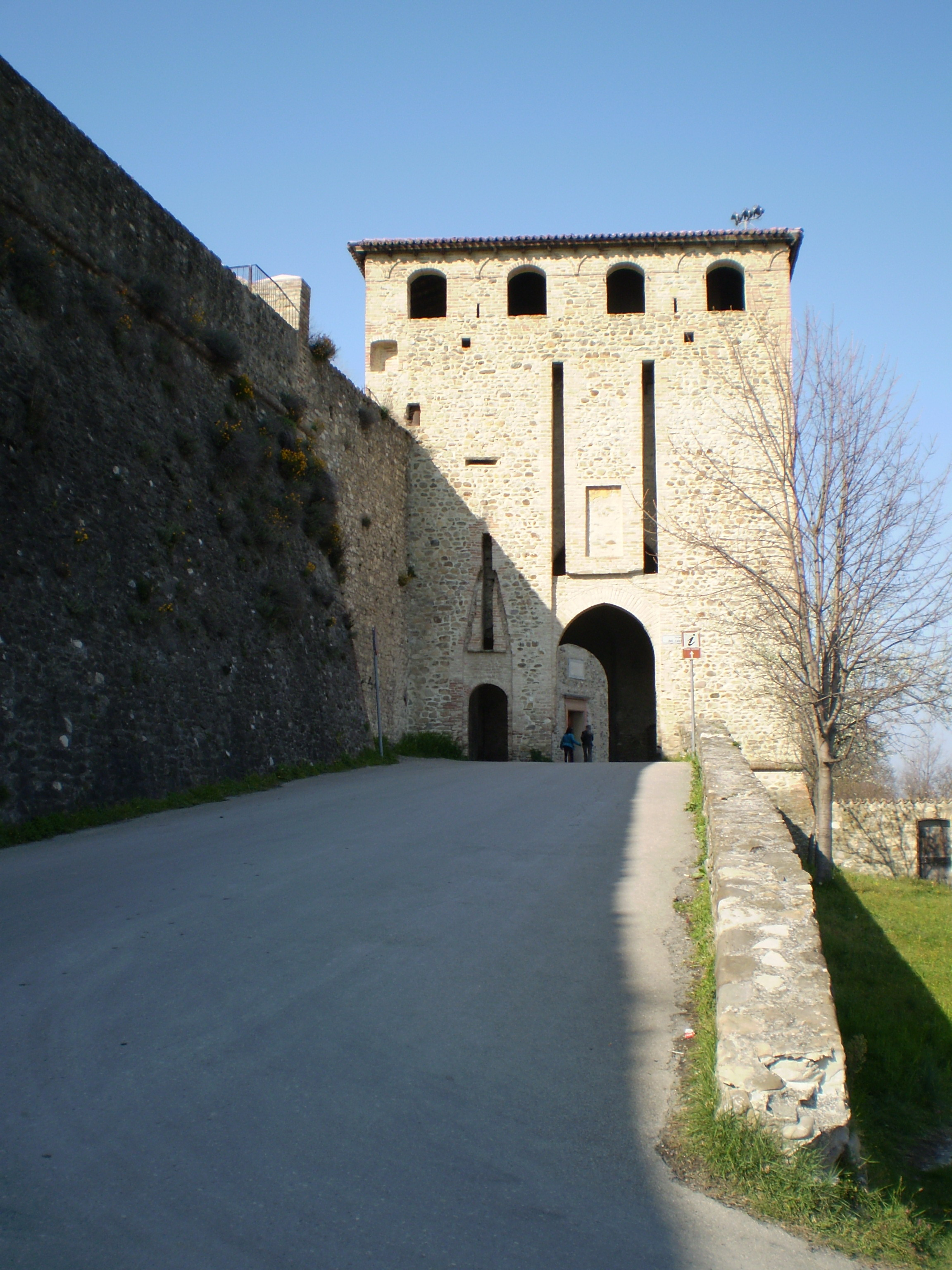 Langhirano - Castello di Torrechiara